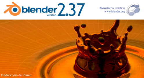 Blender 2.37 Splash Blender Foundation Blender 2.37